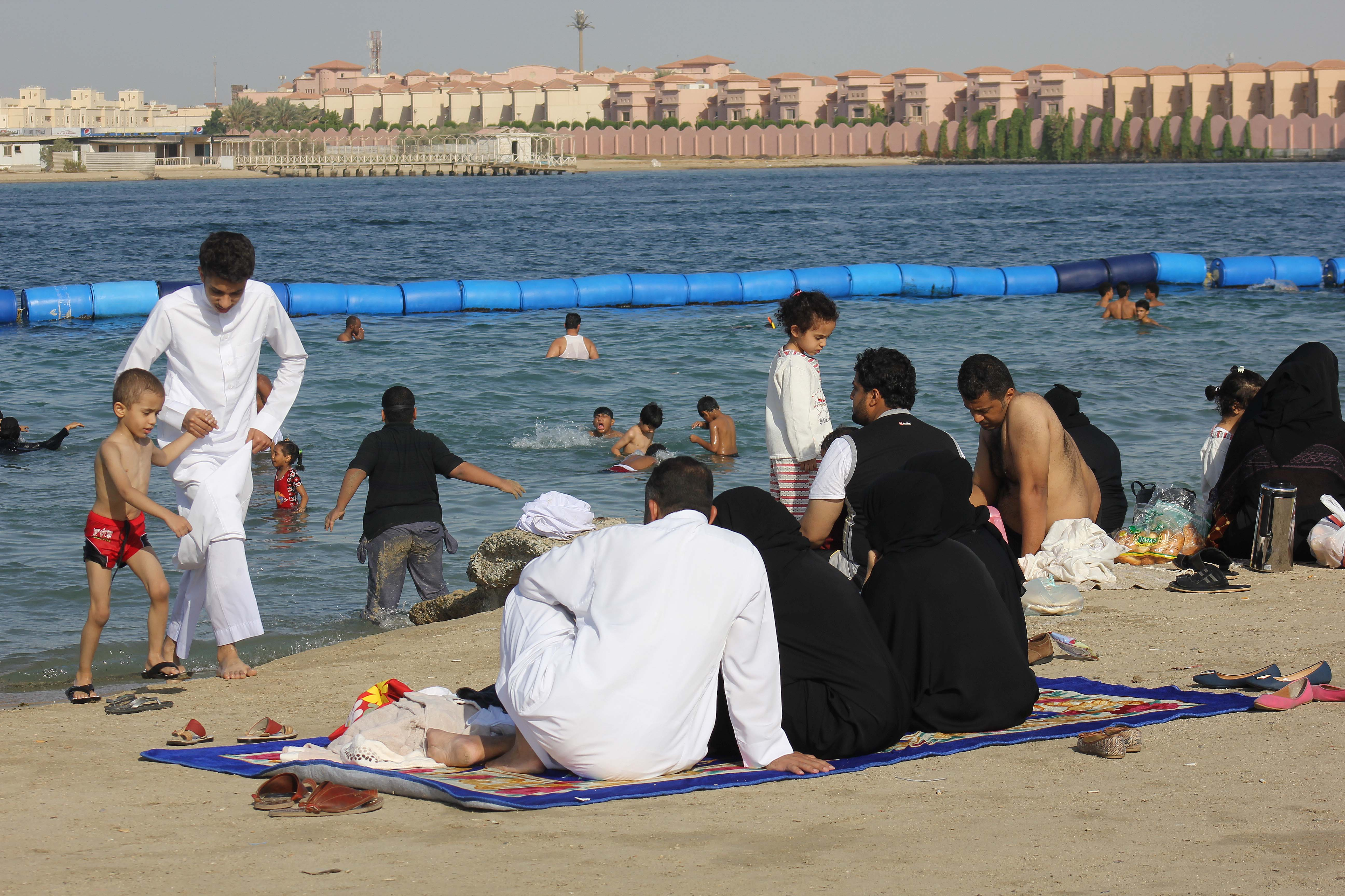 watching